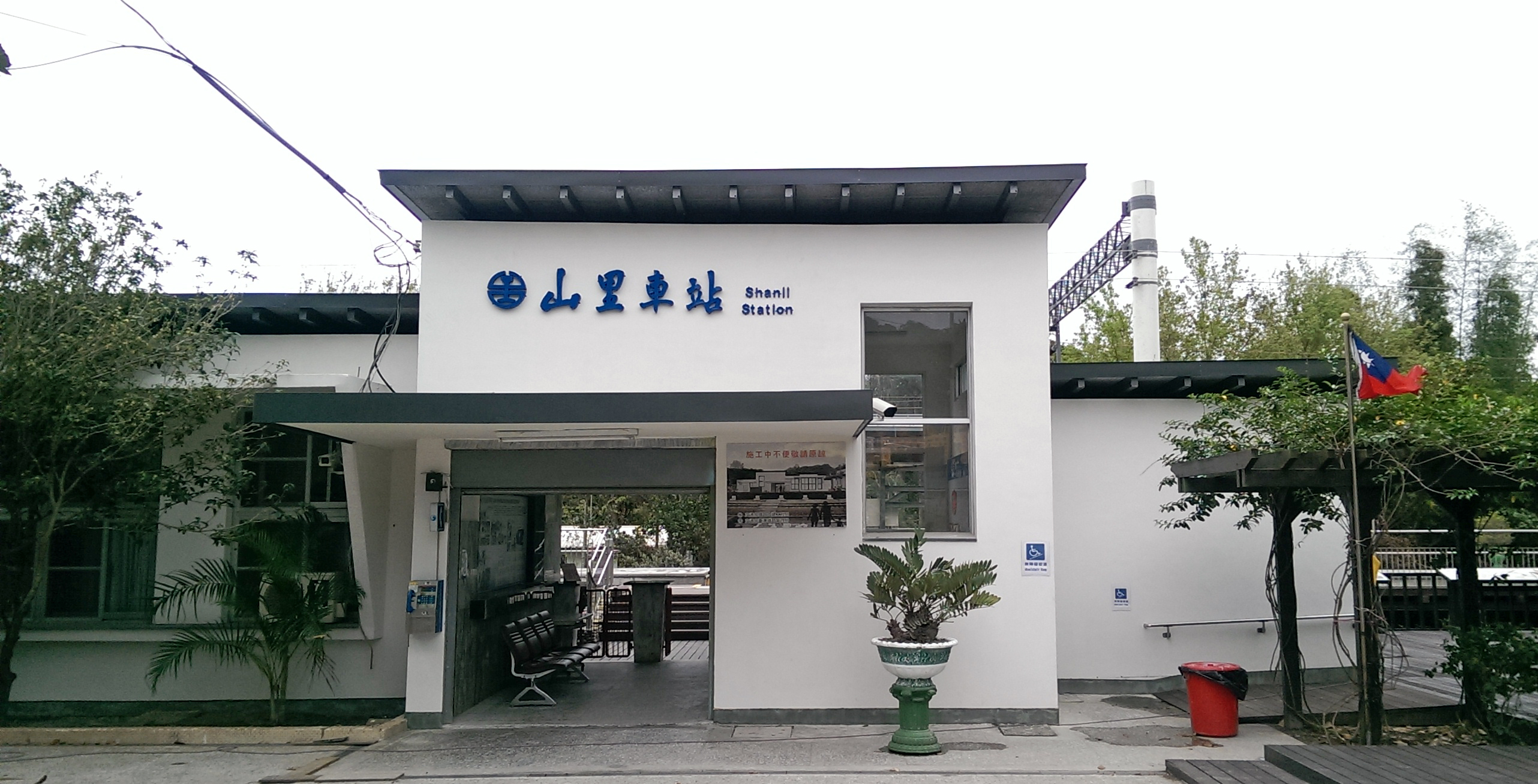 中文（台灣）: 臺東縣卑南鄉山里車站